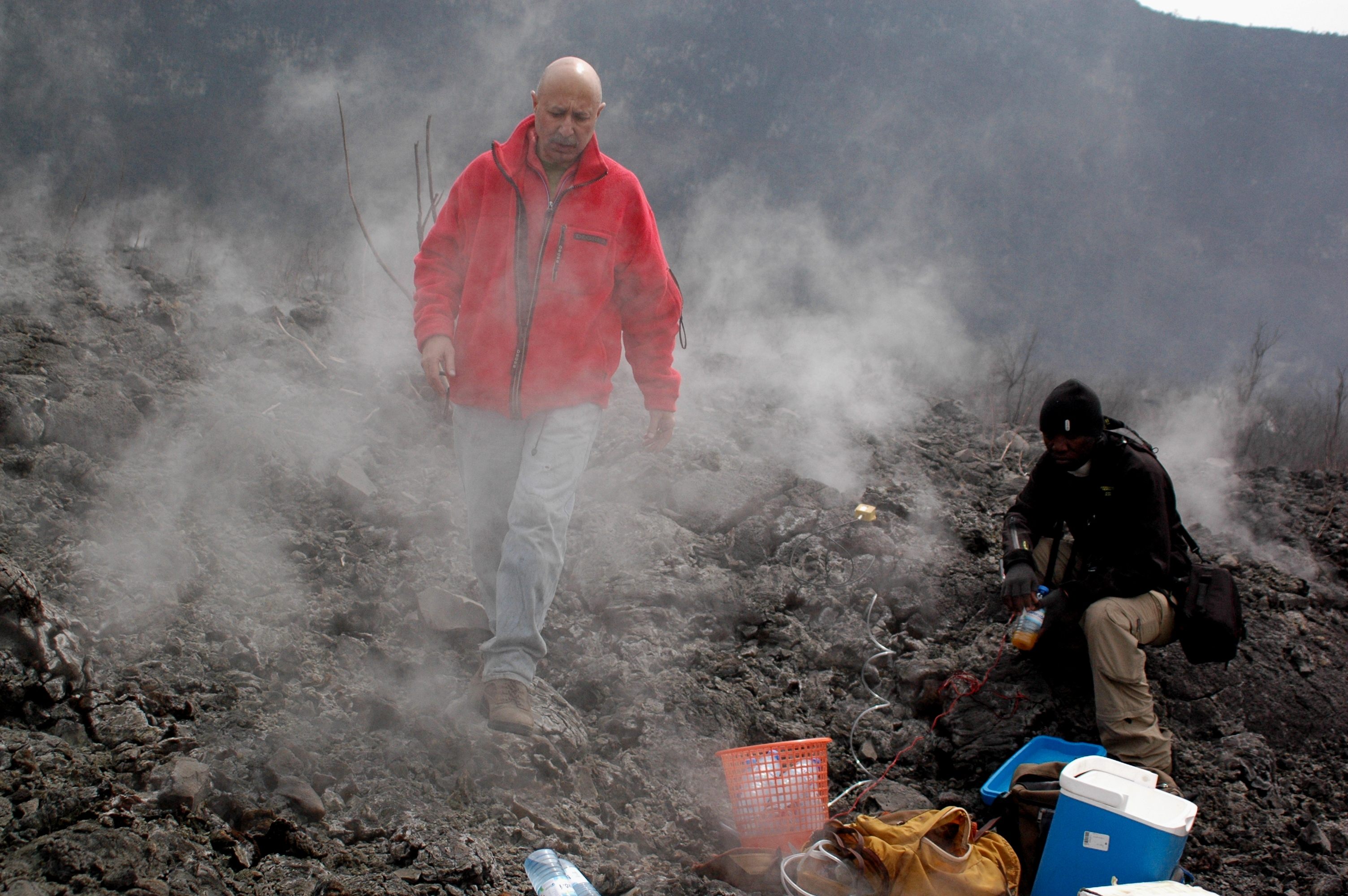 Inside the Nyamuragira volcano! A team of volcanologists conduct an expedition inside the Nyamuragira volcano on 15 February 2014 to take samples of the crater. The team leader (in red), Pr. Dario Tedesco of UNOPS, The United Nations Office for Project Services, was with a researcher from the Volcanic Observatory of Goma, the office in charge of volcanic activities in the country. Mt. Nyamuragira has been described as Africa's most active volcano. It is situated about 25 km north of Goma. Recent eruptions occurred on 2 January 2010 and 8 November 2011. Photo: MONUSCO/Clara Padovan A l’intérieur du volcan Nyamuragira ! Une équipe de volcanologues entreprend le 15 février 2014 une expédition à l’intérieur du volcan Nyamuragira pour prélever des échantillons du cratère. Le chef d’équipe (en rouge), Professeur Dario Tedesco, de l’UNOPS, le Bureau des Nations Unies pour les Services d’Appui aux Projets, était accompagné d’un chercheur de l’Observatoire volcanique de Goma, l’institut national chargé des études volcaniques en R. D. Congo. Nyamuragira est réputé pour être le volcan le plus actif en Afrique. Situé à environ 25 km au Nord de Goma, ses éruptions les plus récentes datent du 2 janvier 2010 et 8 novembre 2011. Photo: MONUSCO/Clara Padovan